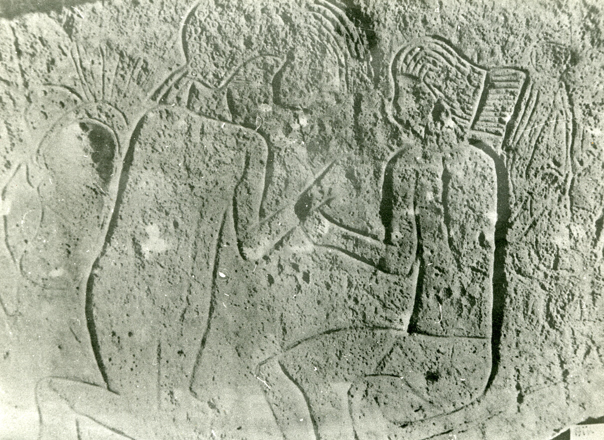 gravure préhistorique de la région de Djelfa (Algérie)